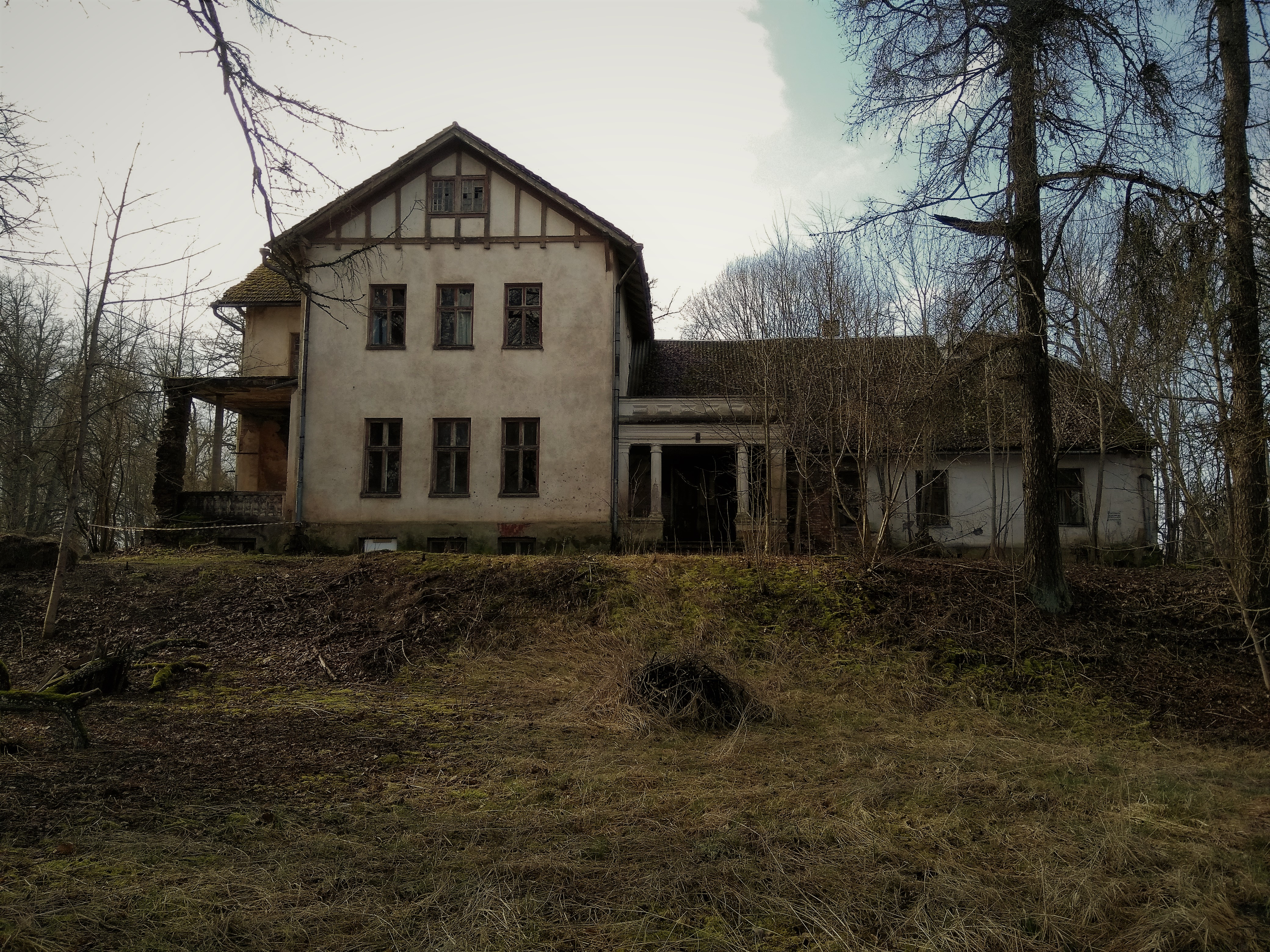 Vaade linnuseala idavallile ja mõisaehitistele idast. Vasakul uuem ja paremal vanem mõisahäärber.